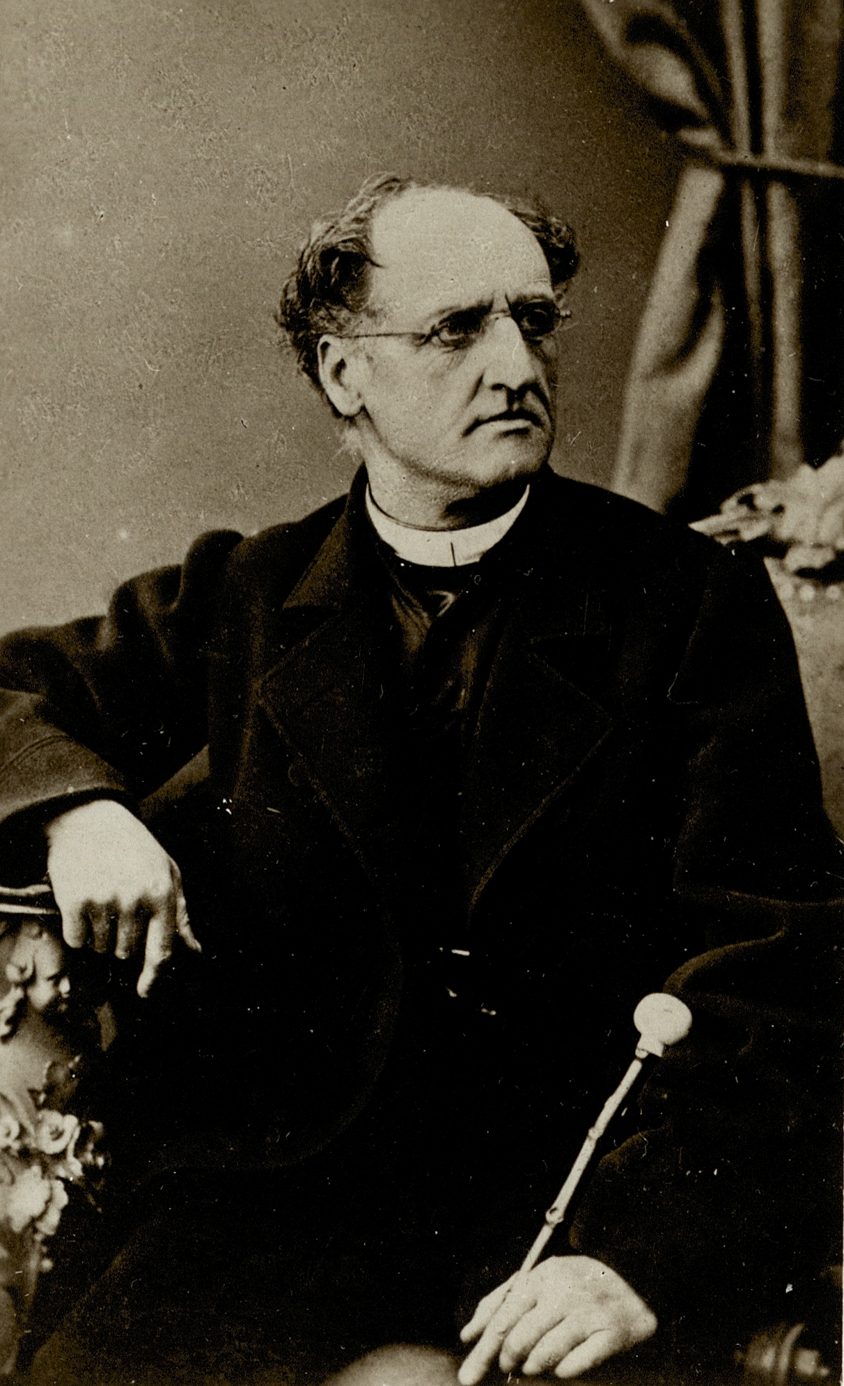 Andrej Einspieler (1813-1888), Slovene politician and priest.